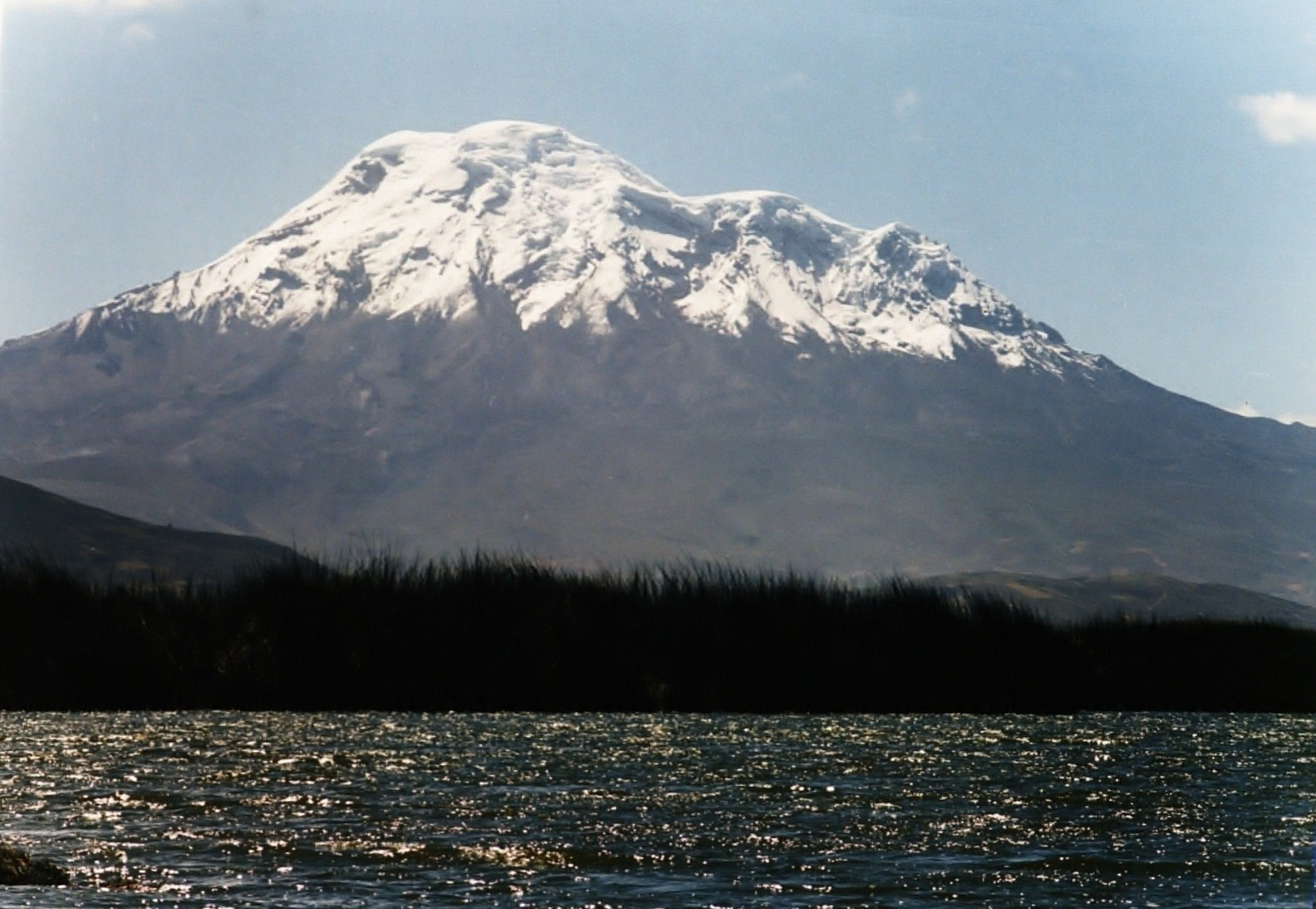 Volcán Chimborazo visto desde la laguna de colta en la provincia de Chimborazo